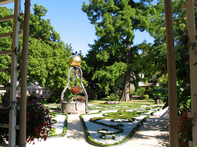 Katzscher Garten